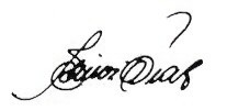 Simón Díaz Signature